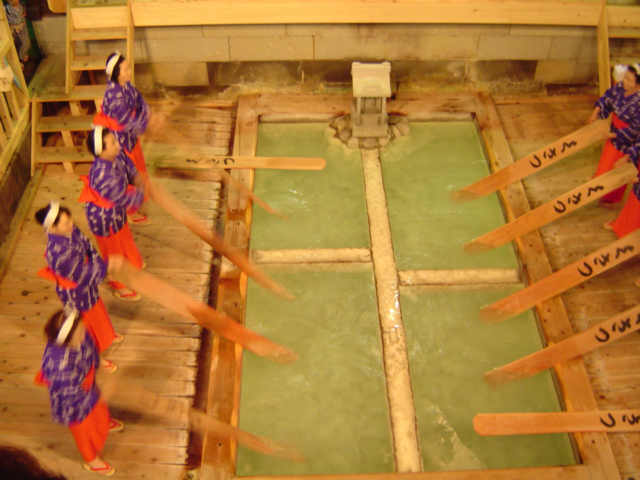 草津温泉・熱の湯で観光客向けに行われている「湯もみ」ショー